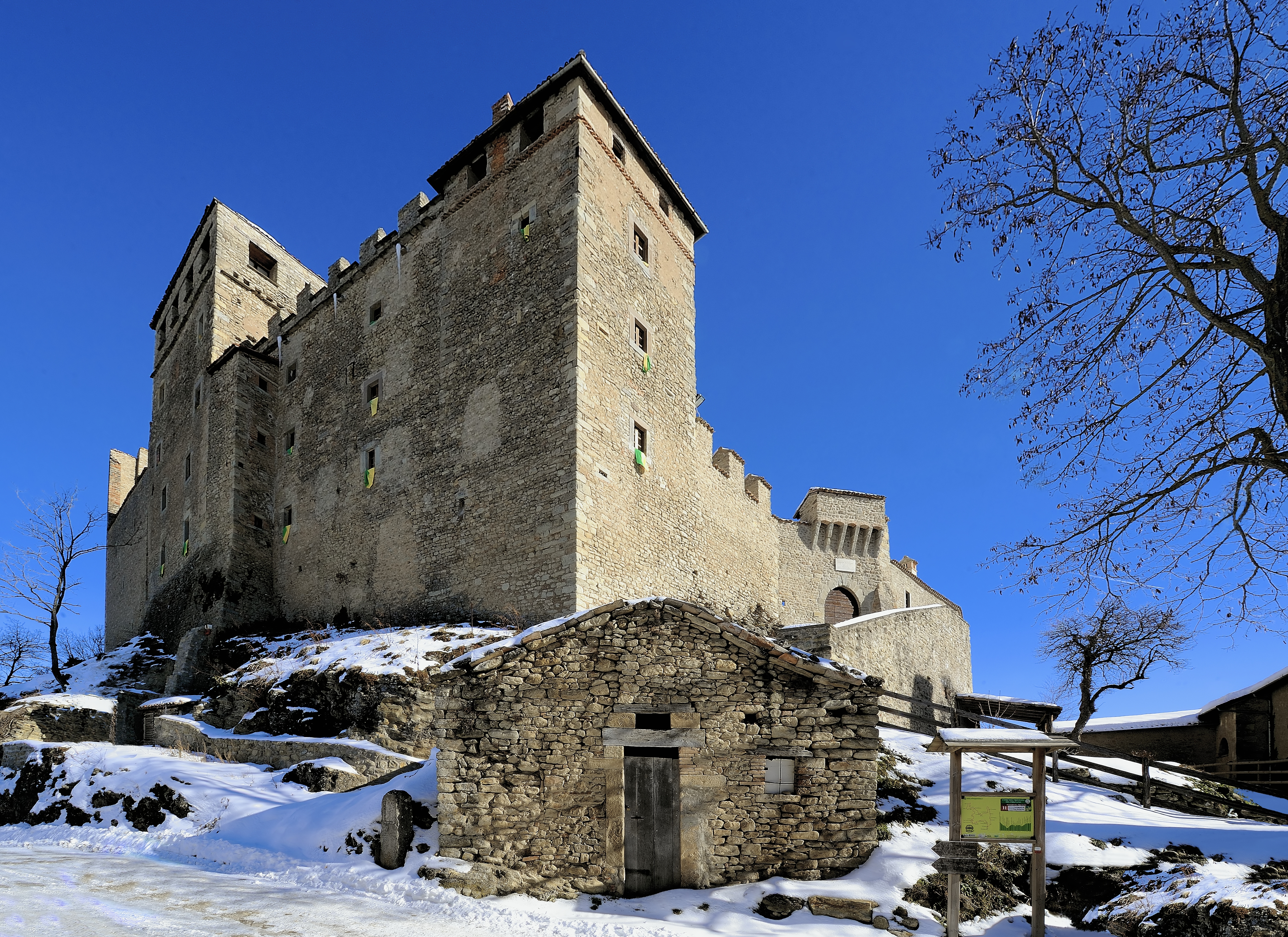 Castello di Montecuccolo - MIBAC This is a photo of a monument which is part of cultural heritage of Italy.